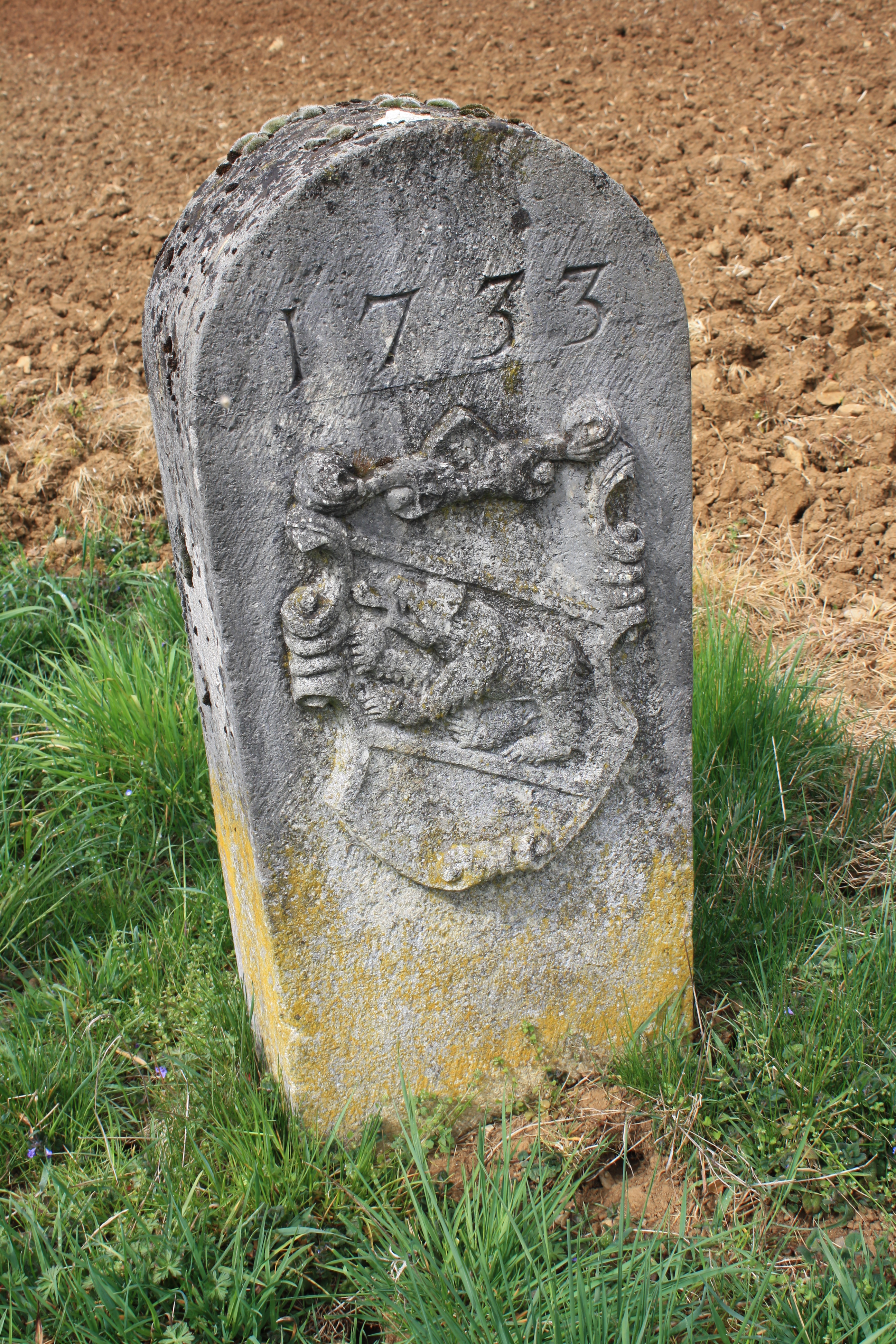 Bernisch-österreichicher Grenzstein von 1733 zwischen Bözen und Hornussen bei N 47.498874 O 8.075191